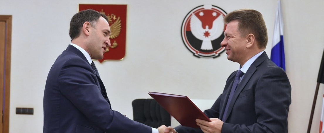 Соглашение с главой правительства Республики Удмуртия Ярославом Семёновым